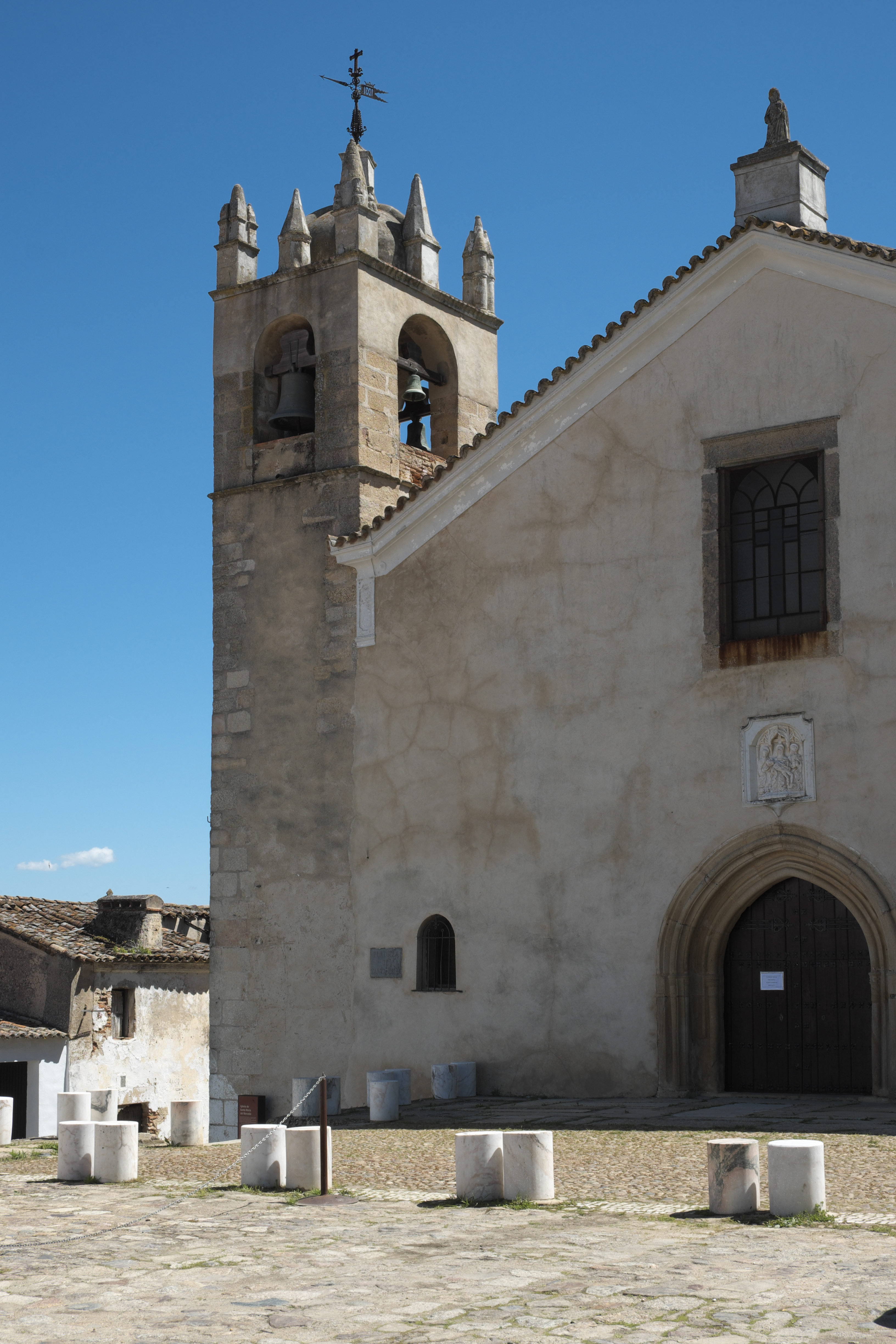 Kirche Santa María del Mercado in Alburquerque in der Provinz Badajoz (Extremadura/Spanien), Westfassade